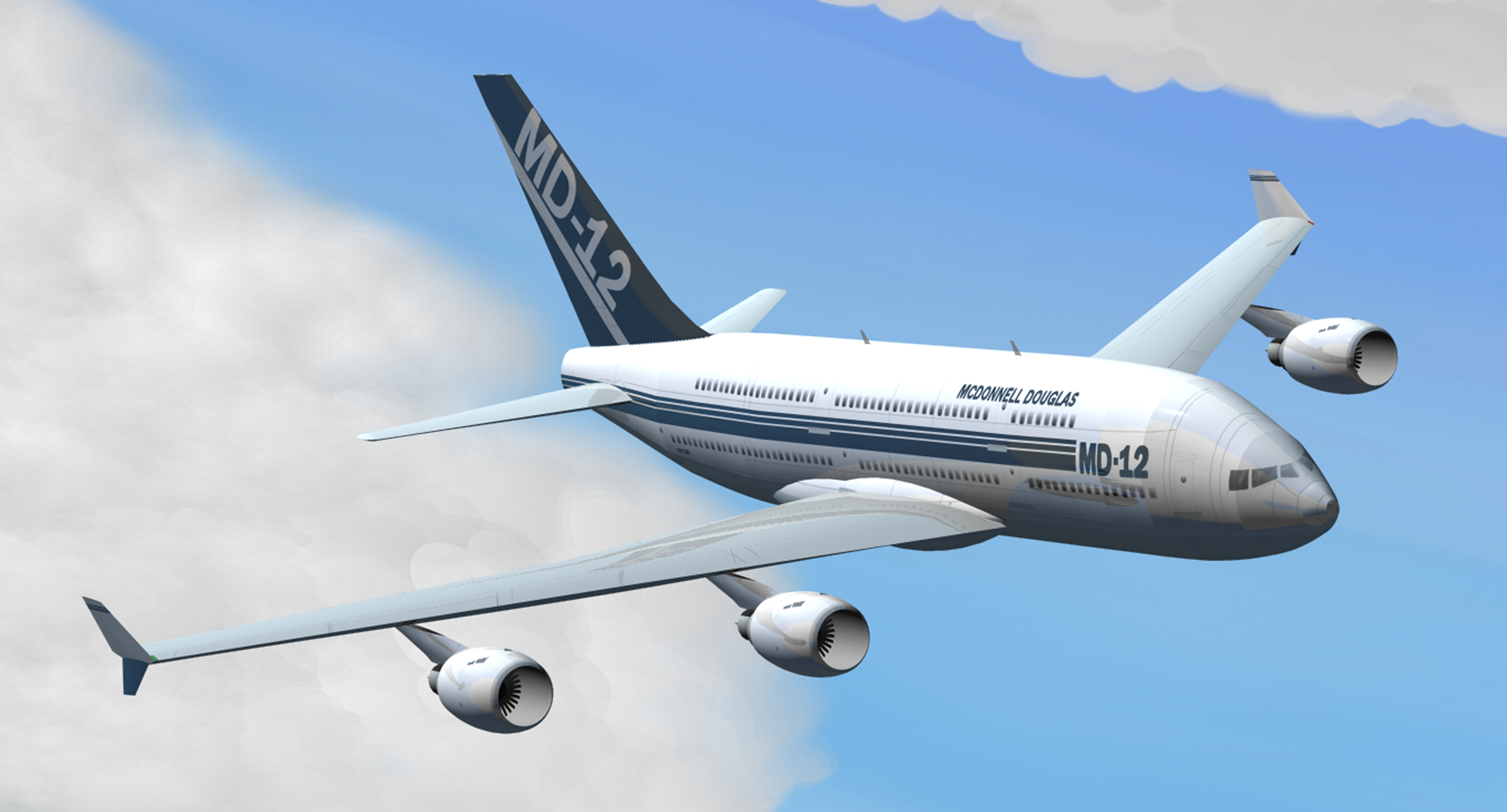 MD-12